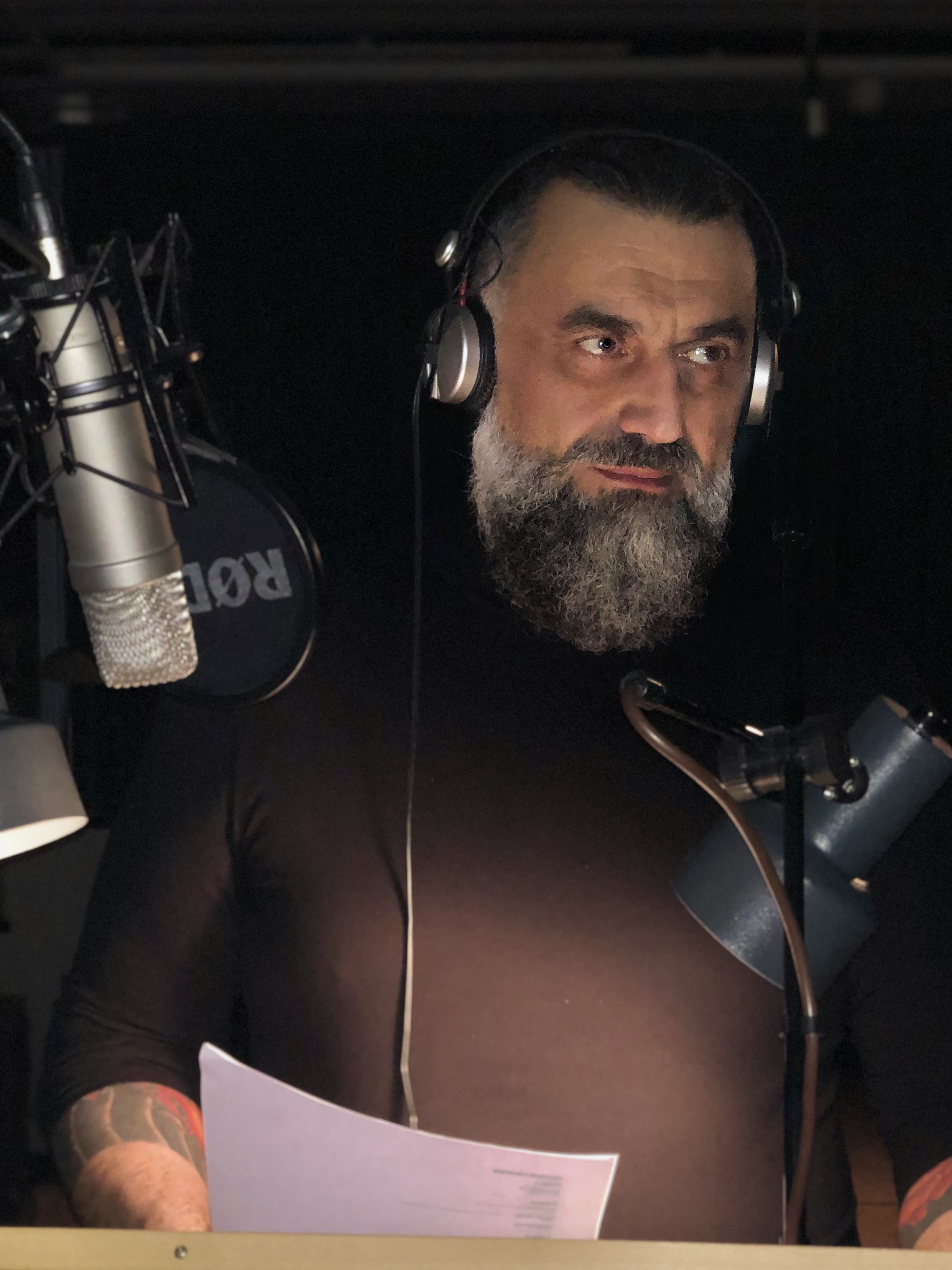 George Liratsis während Synchronaufnahmen der Webserie Patchwork Gangsta im Synchronstudio des Südwestrundfunk in Baden-Baden.